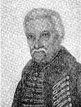 Boráros János (1756–1834) Pest város főbírája, alpolgármester